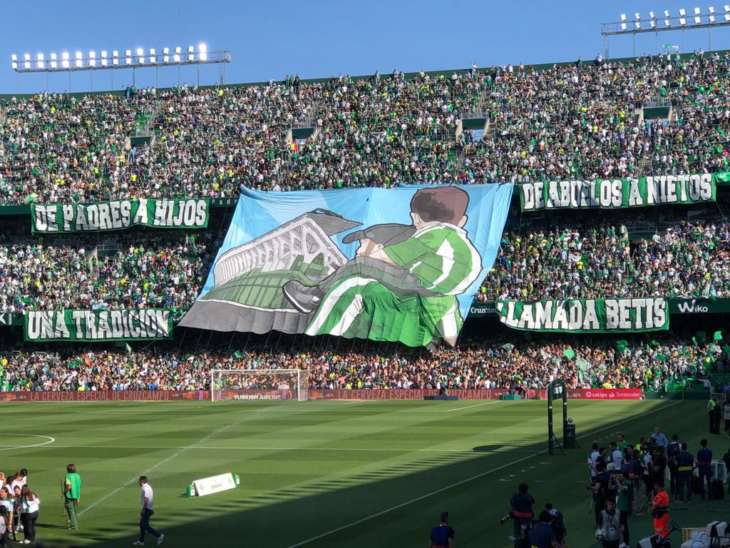 Tifo realizado por la Grada de Animación del Real Betis en el partido Real Betis vs Sevilla FC